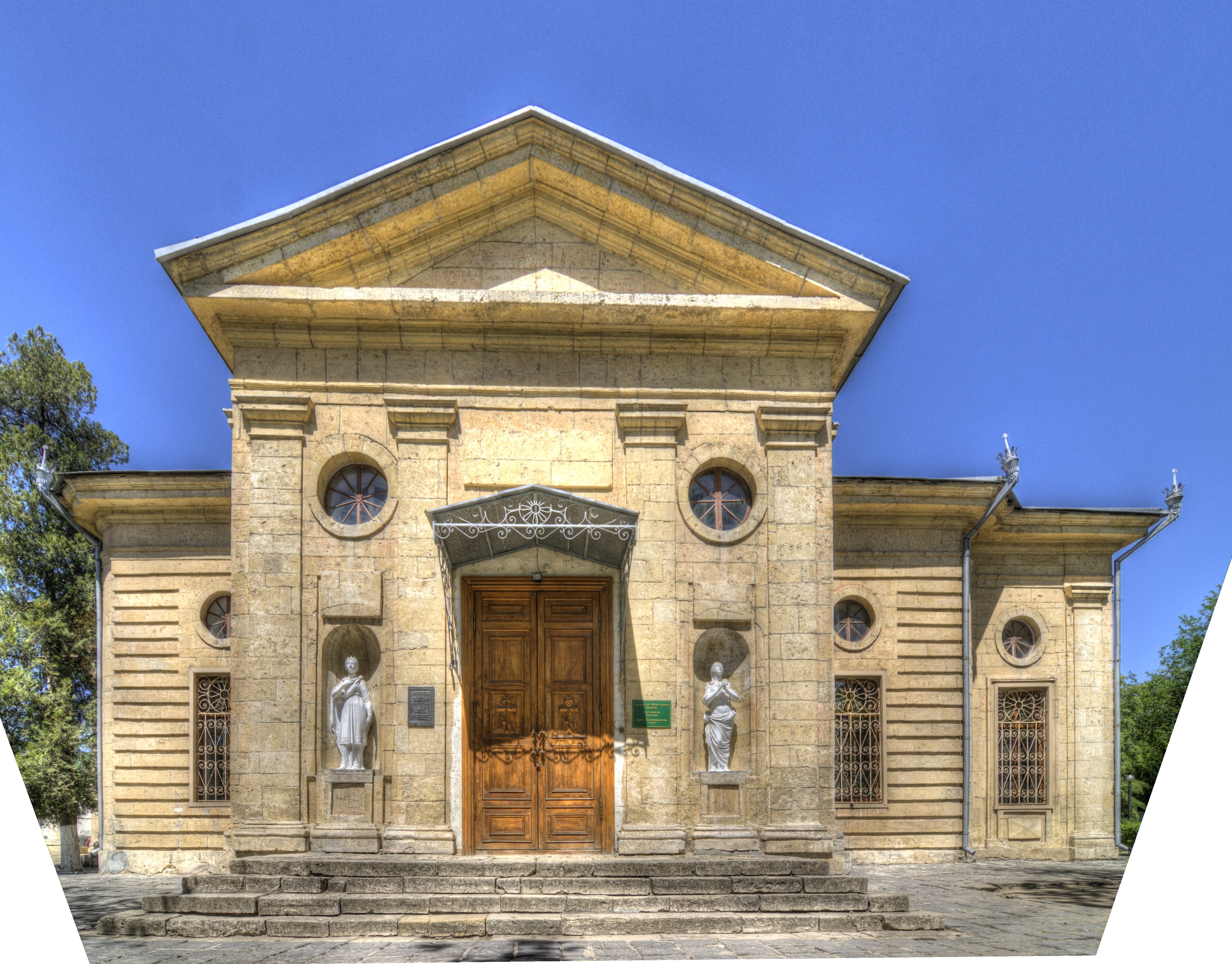 Катерининський собор (мур.), Херсон, Перекопська вул., 13